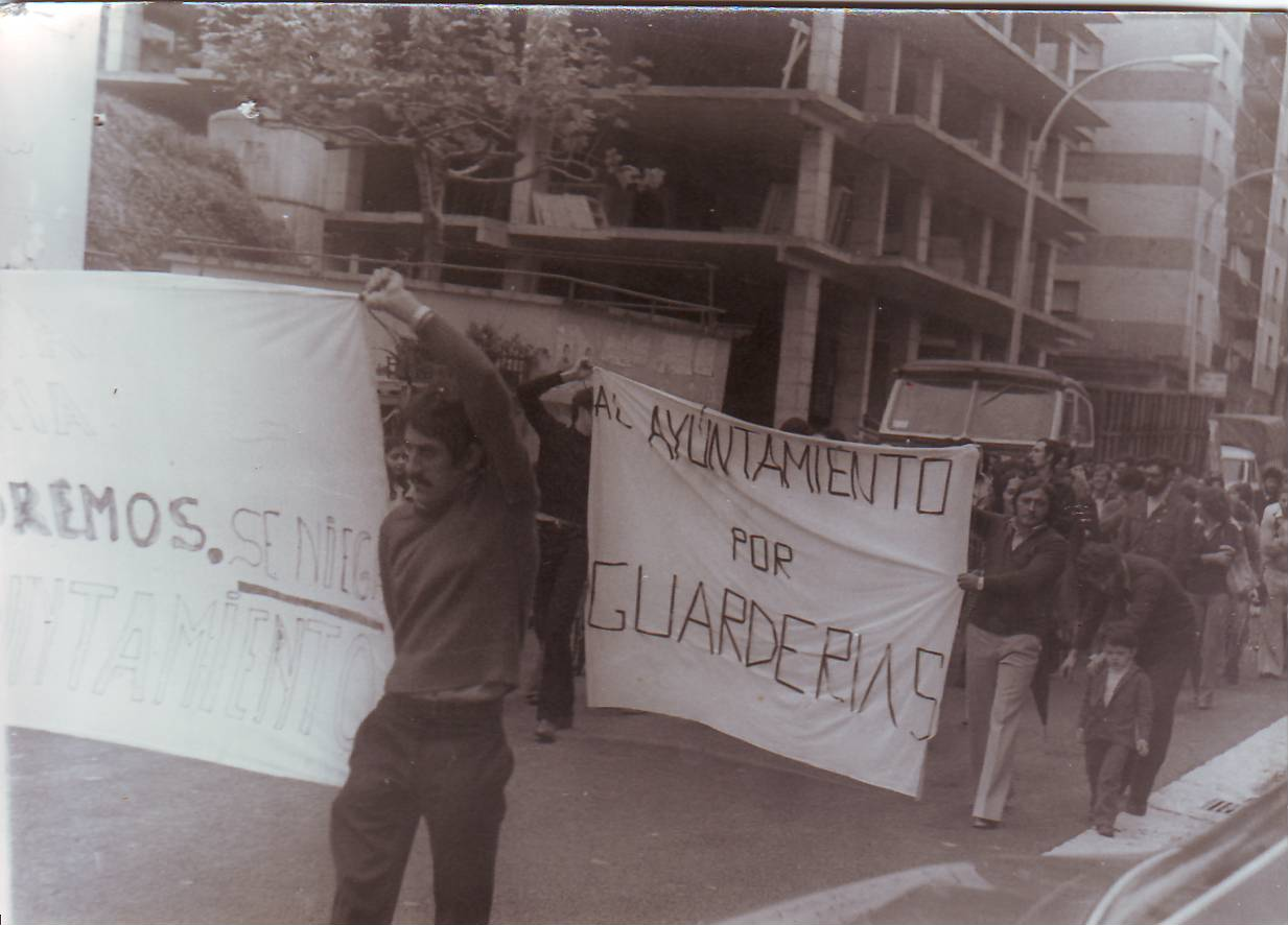 Larratxo 1977ko abendua. Haurtzaindegia eskatzeko manifestazioa